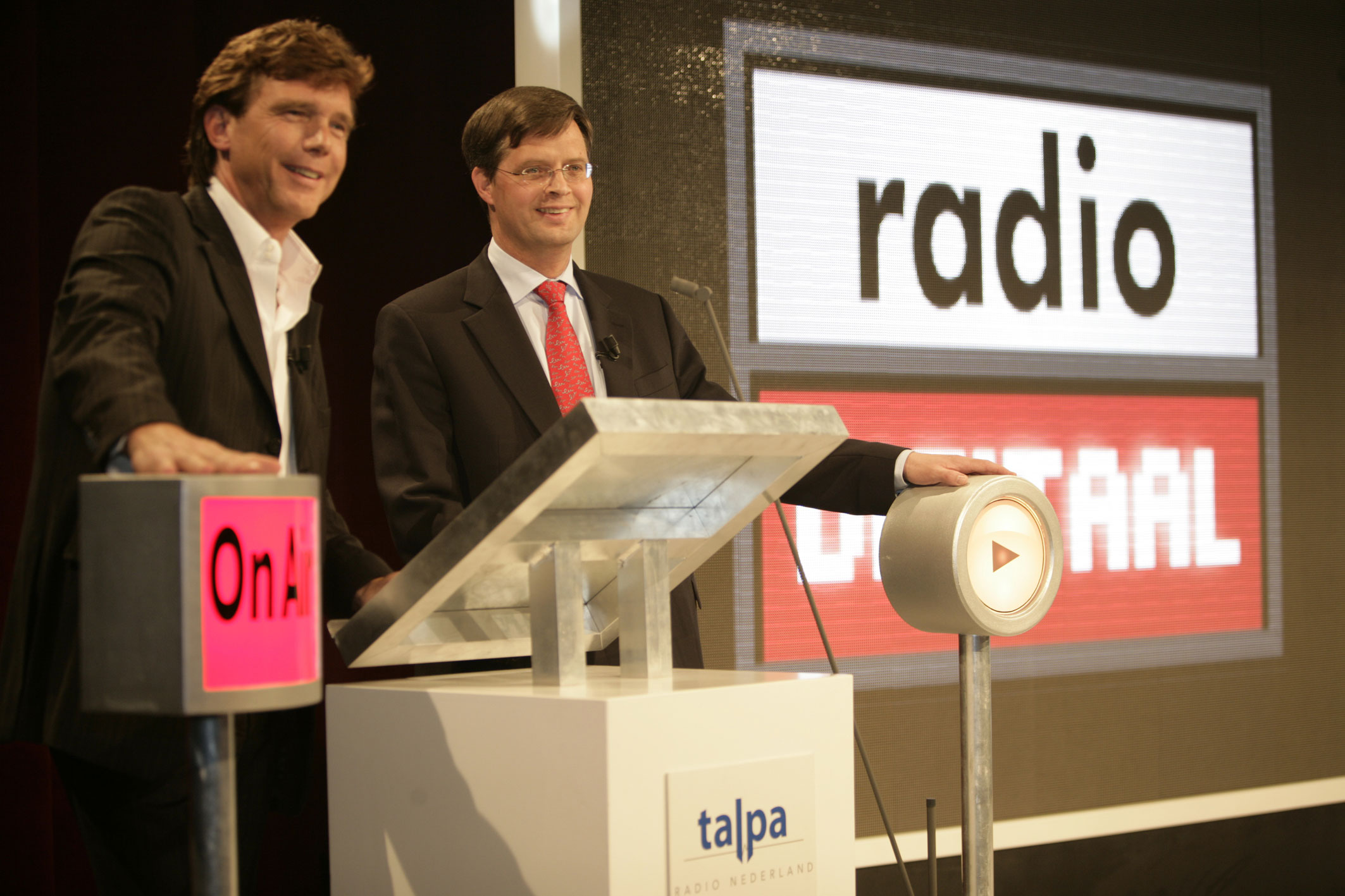 Start radiodigitaal.nl door premier Jan Peter Balkenende and John de Mol